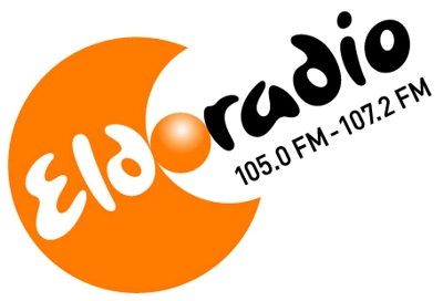 Logo von